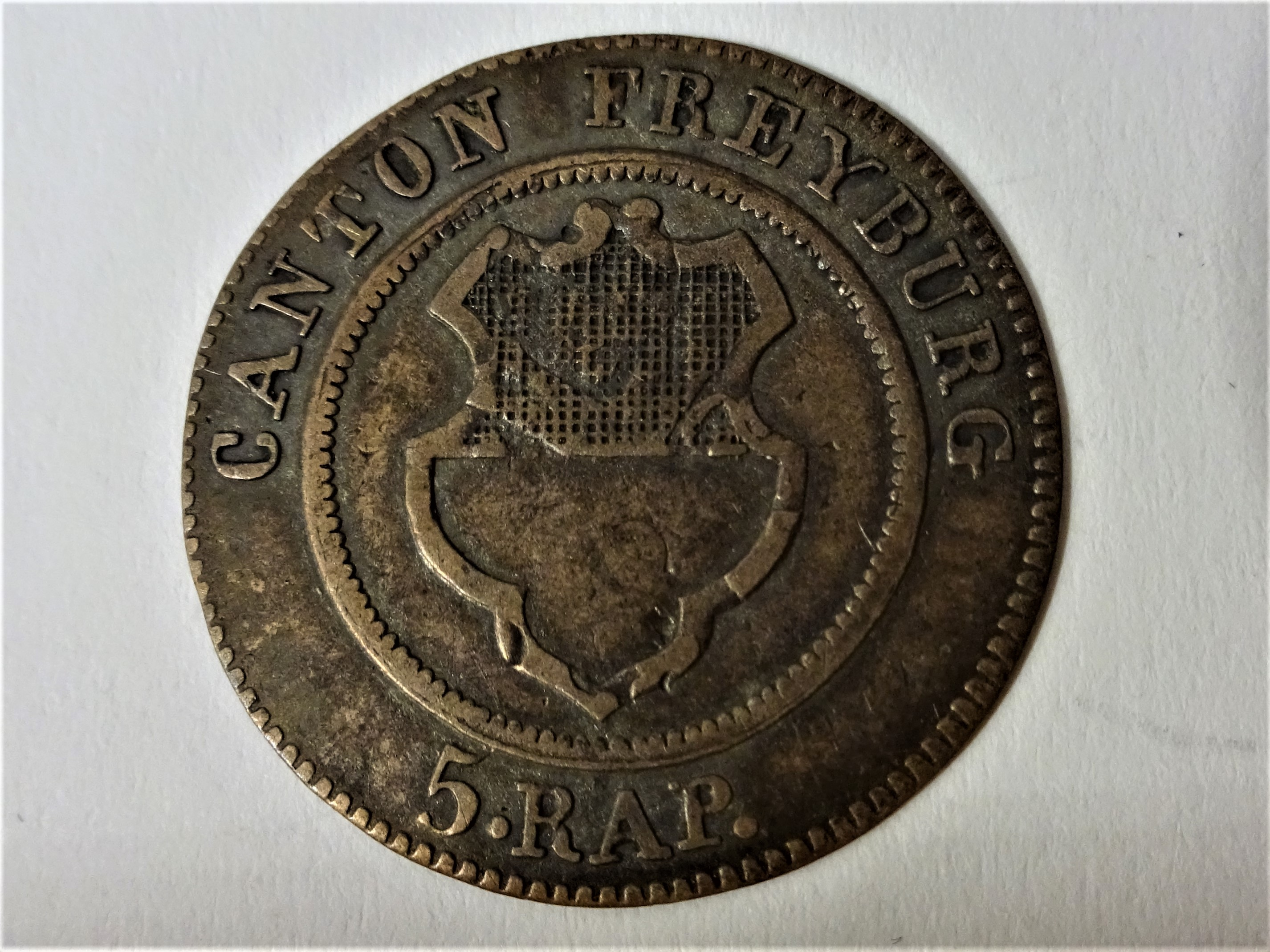 1/2 Konkordatsbatzen des Kantons Freiburg aus 1830, Wappenseite, Schön/Cartier Nr. 13